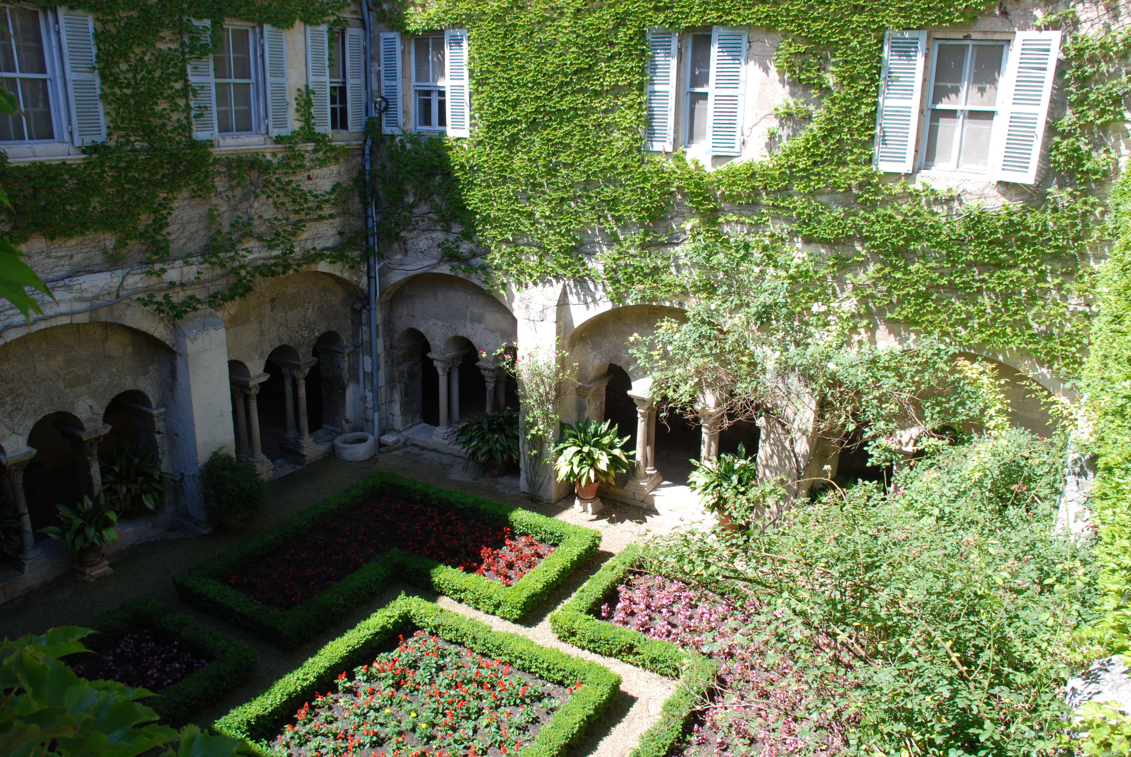 France - Provence - Bouches-du-Rhône - Saint-Paul-de-Mausole